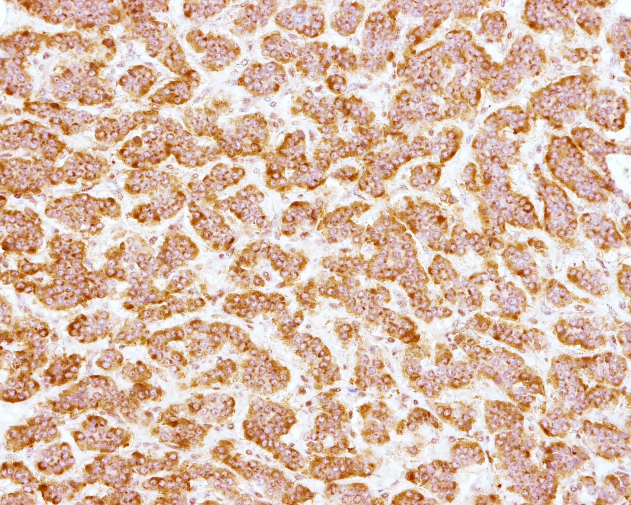 膵神経内分泌腫瘍 Neuroendocrine tumor of pancreas.（synaptophysin）